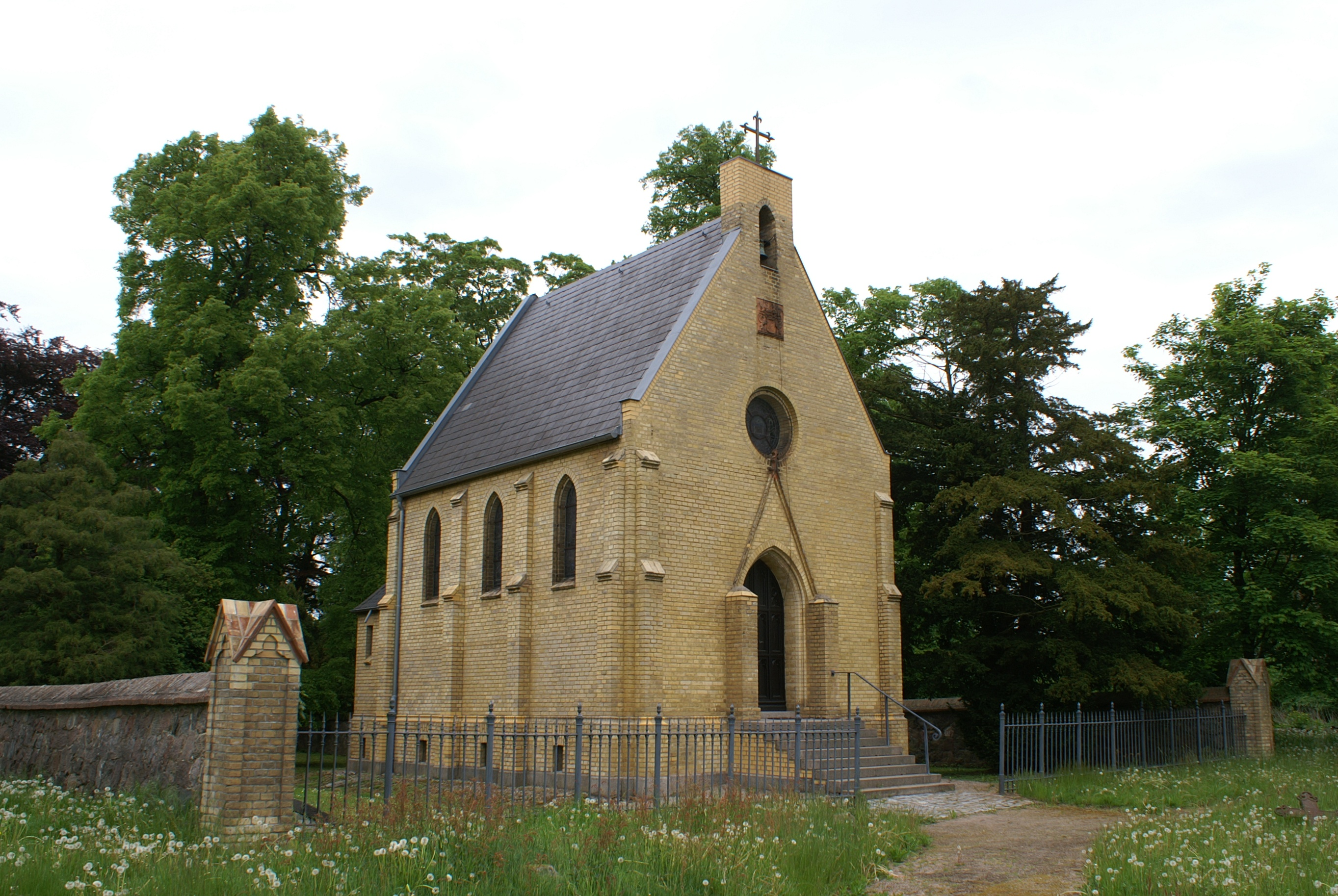 Karlsburg (Landkreis Ostvorpommern) - Ortsteil Steinfurth - Grabkapelle - Ehemalige Begräbnisstätte der Familie von Bismarck-Bohlen